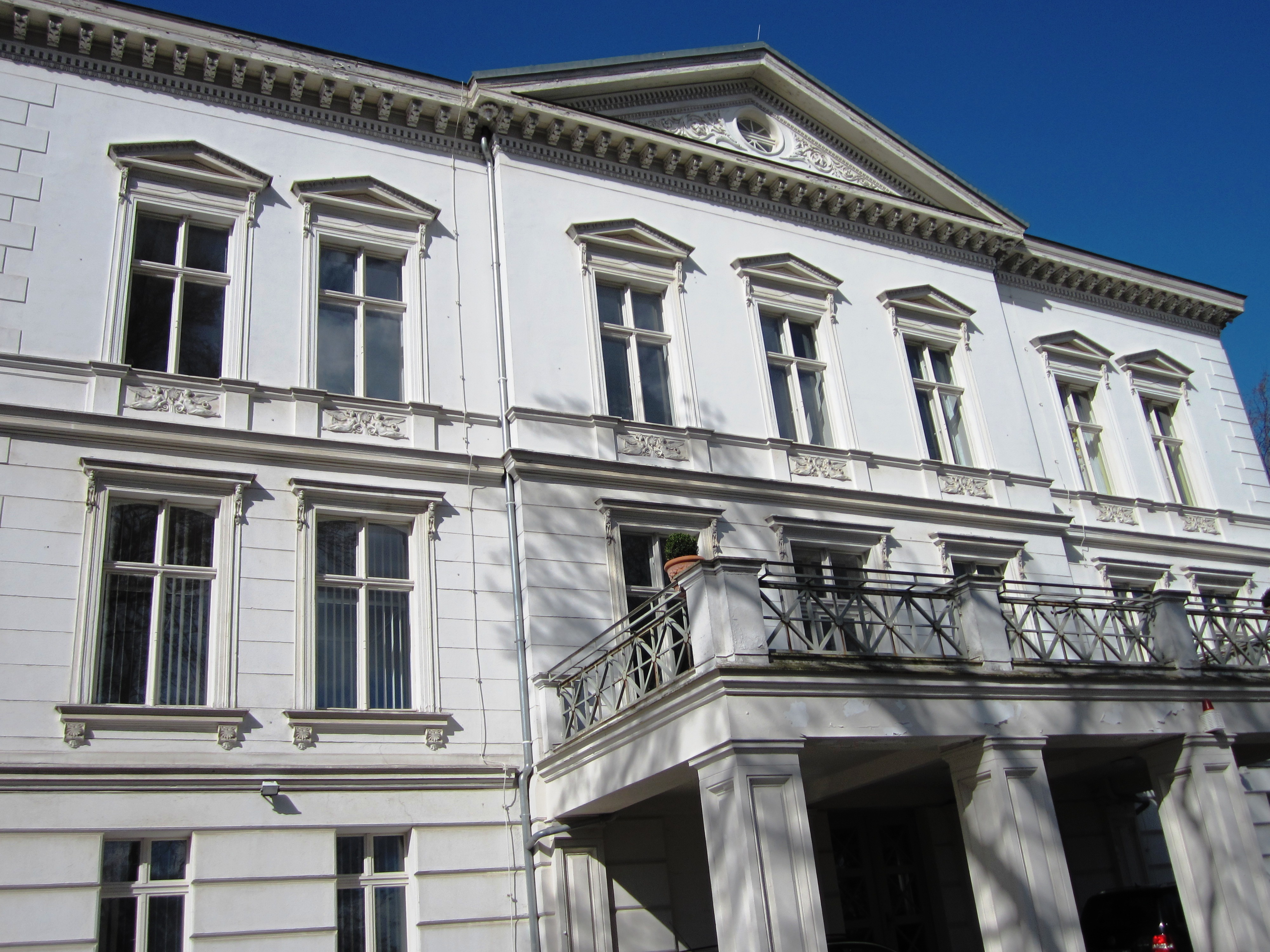 Frankfurt (Oder), Halbe Stadt 6